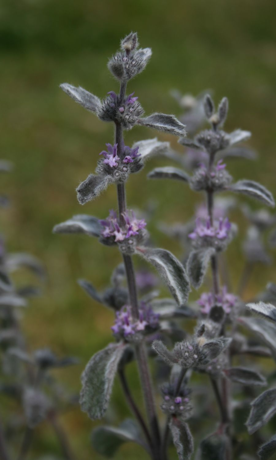 Marrubium astracanicum subsp. astracanicum, Lippenblütler (Lamiaceae) - Türkei/Türkiye/Turkey: Prov. Bolu/Bolu ili, Köroğlu Dağları, an der Straße ca. 4,5 km WNW Karaköy, WNW Kıbrıscık, ca. 1250 m s.m.